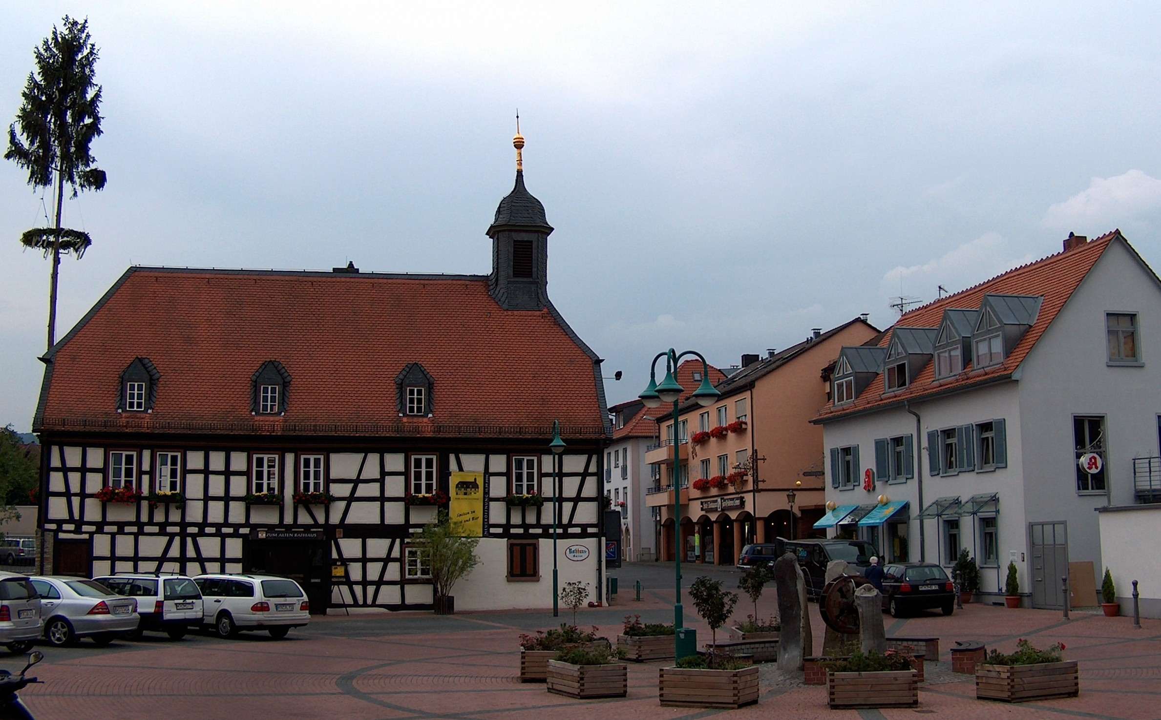 en.: Former city hall at Kelkheim-Münster, Germany. dt.: Historisches Rathaus in Kelkheim-Münster, Hessen.